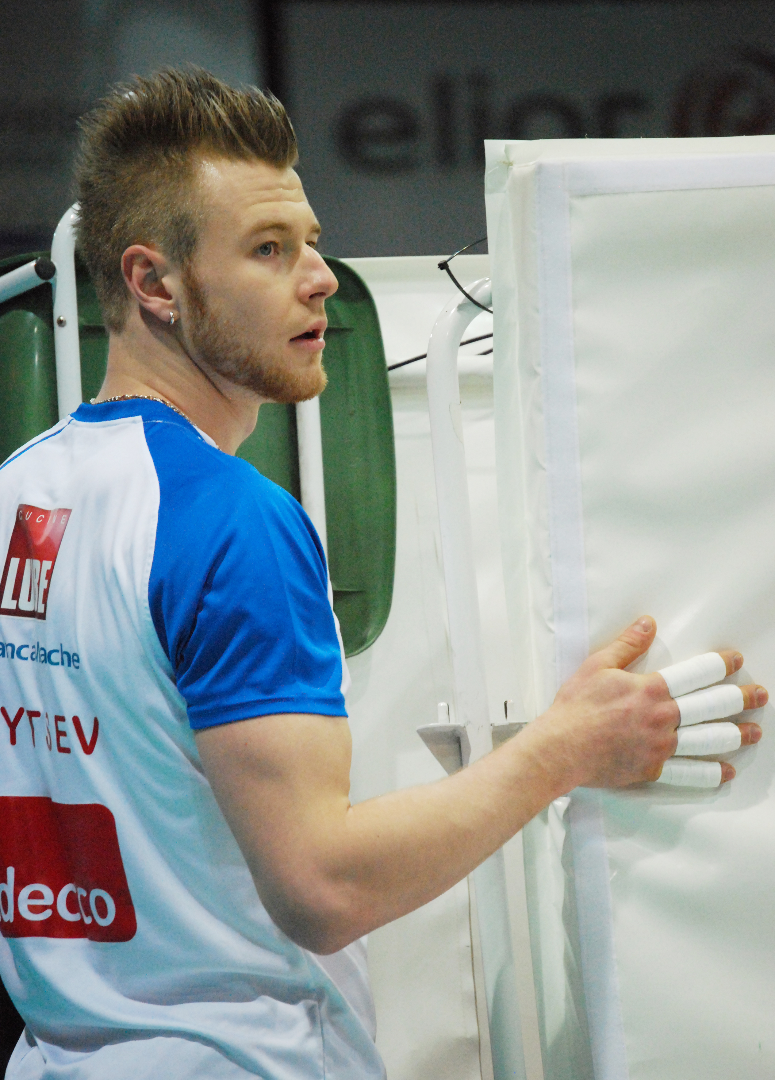 Ivan Zaytsev